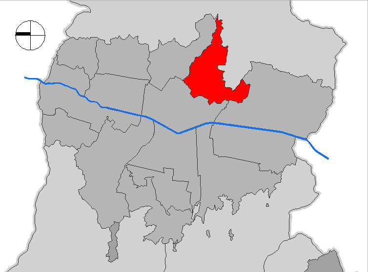 mapa de la comuna Buenos Aires. Medellín, Colombia.